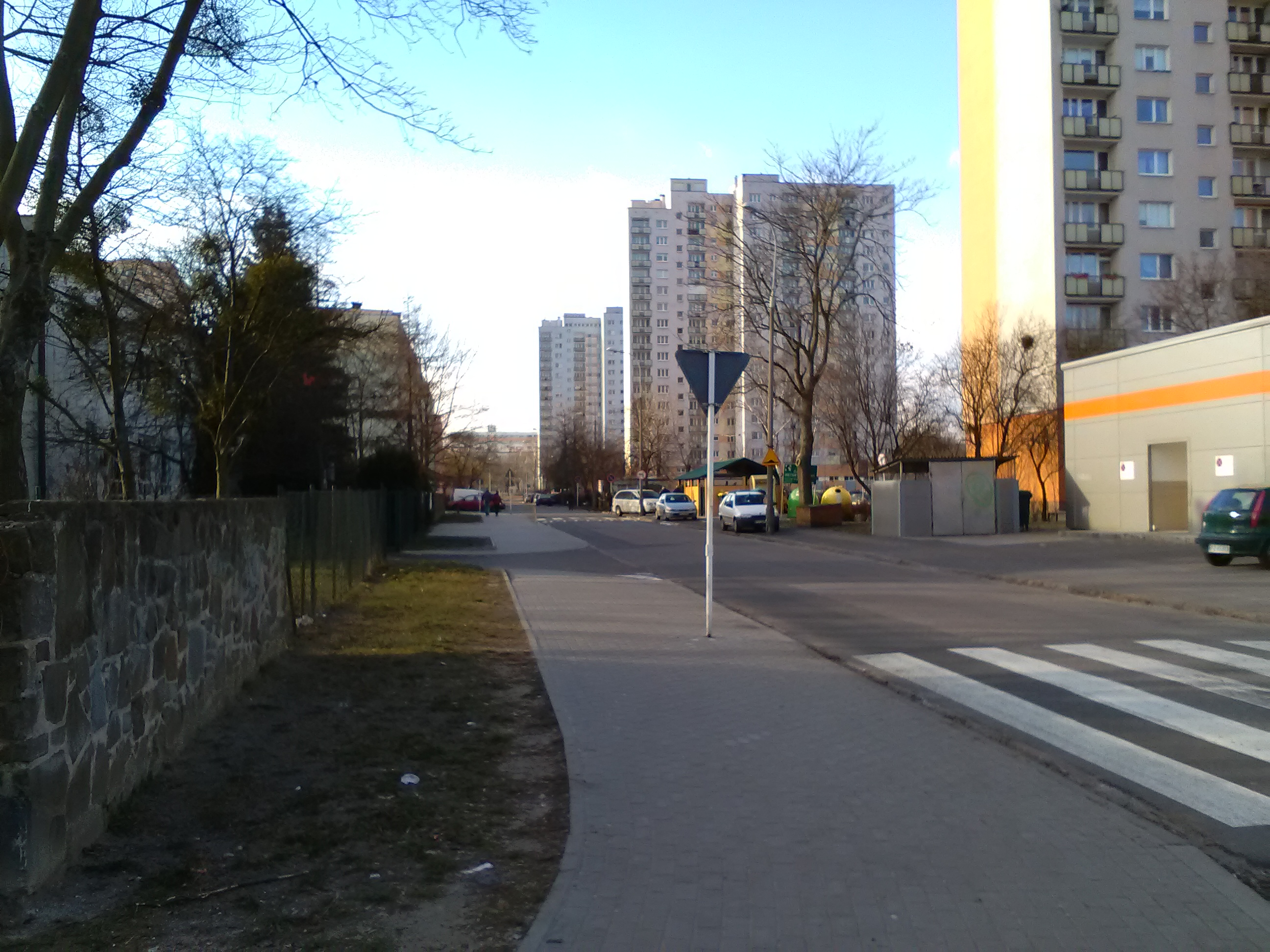 Ulica Jastrzębia w Poznaniu, Osiedle Rzeczypospolitej, widok na bloki 1 i 3.